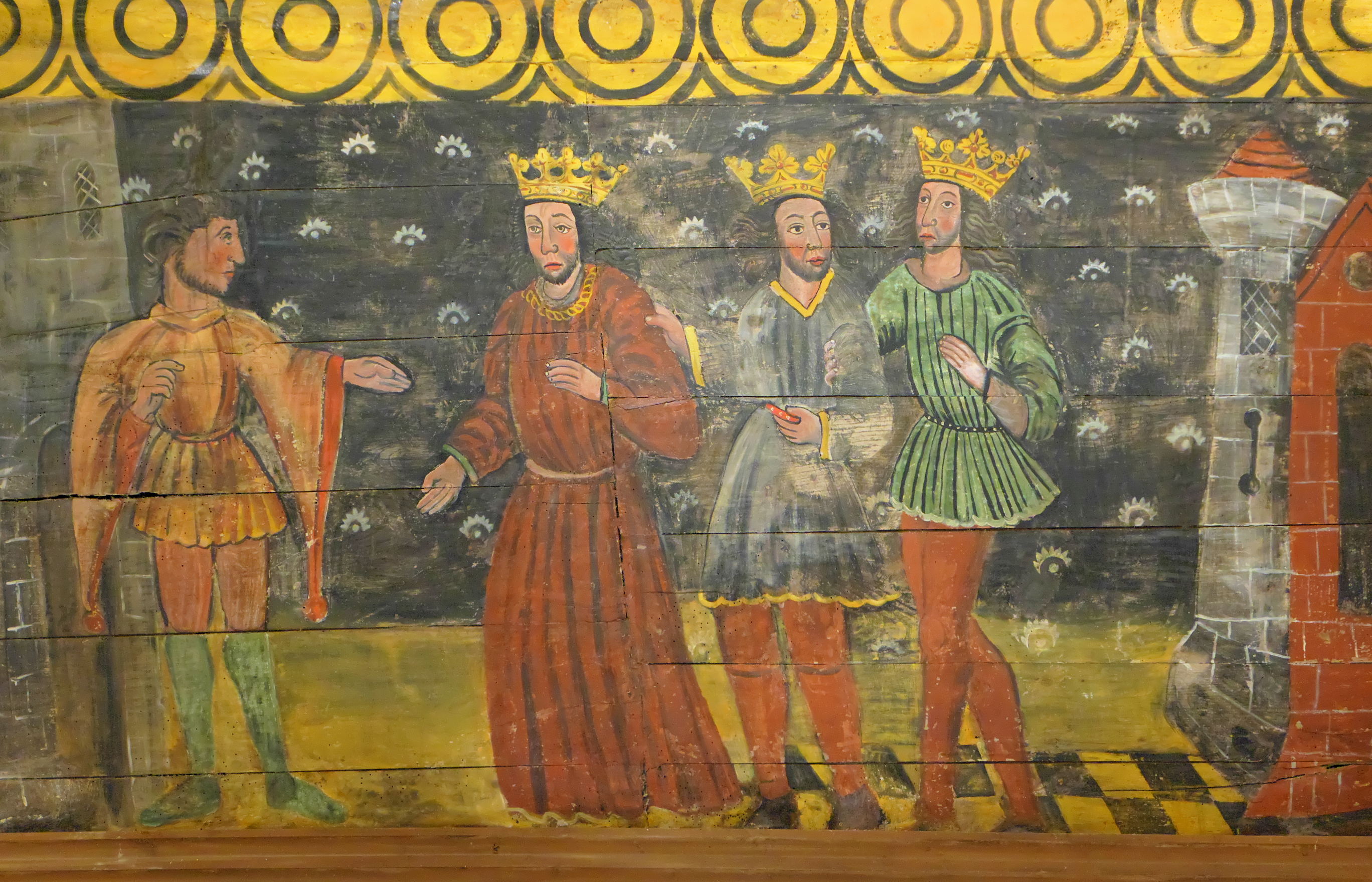 Bild der Drei Heiligen Könige im Deckengewölbe der Kirche Saint-Gonery in Plougrescant in der Bretagne, Frankreich